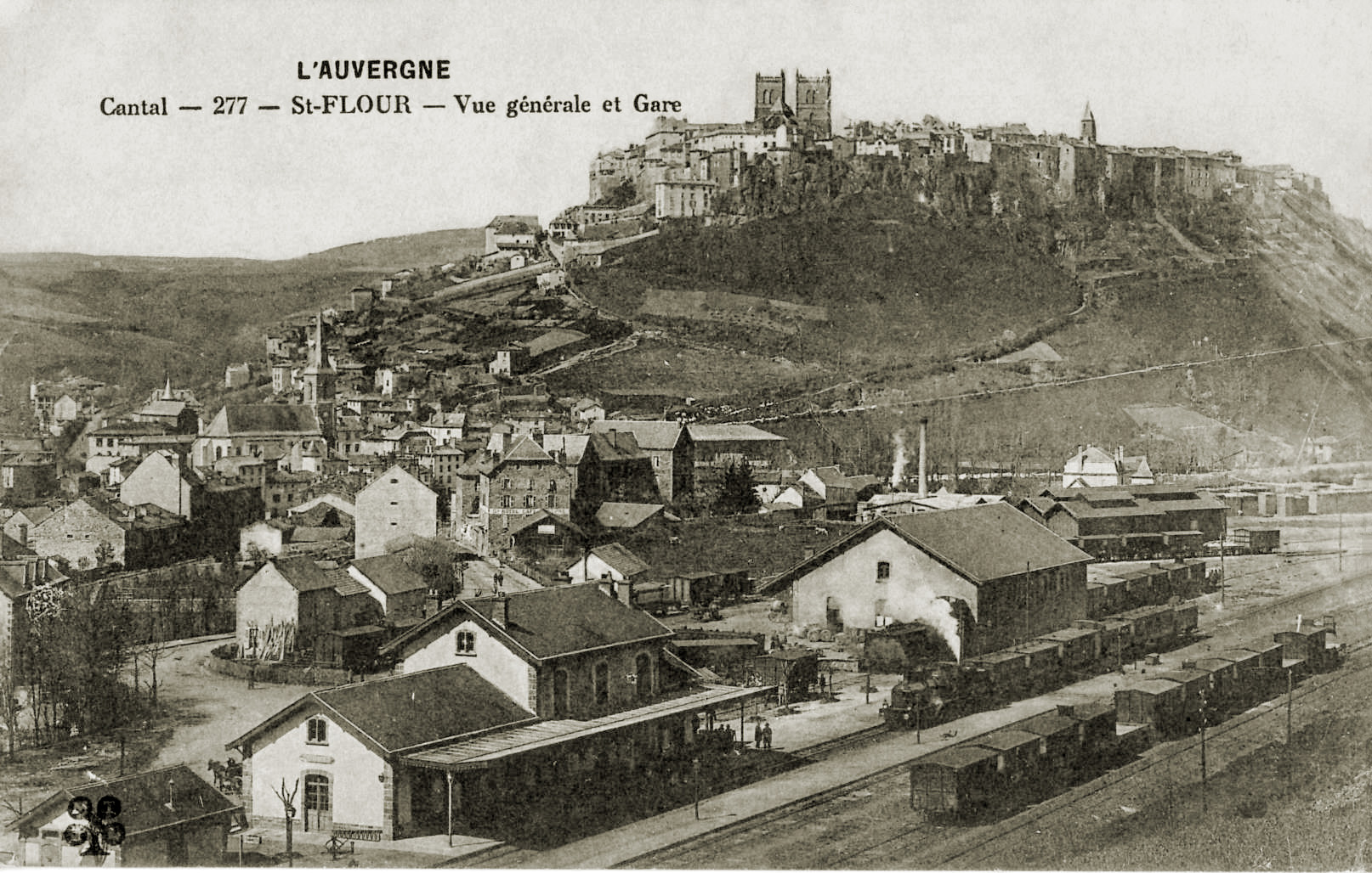 Carte postale ancienne éditée par MTIL, collection Auvergne - Cantal, n°277 : SAINT-FLOUR - Vue générale et Gare